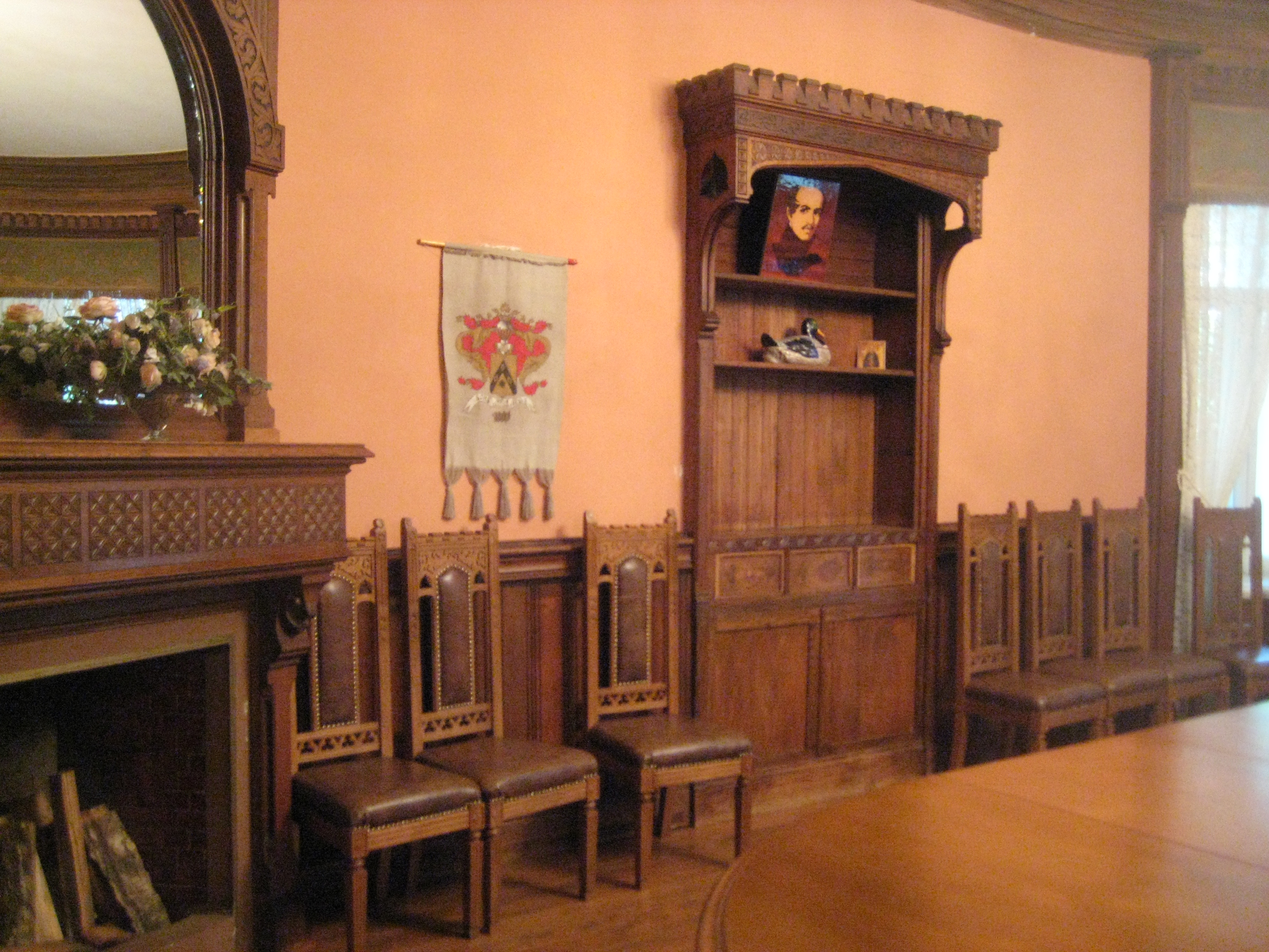 Усадьба Середниково. Интерьер главного здания